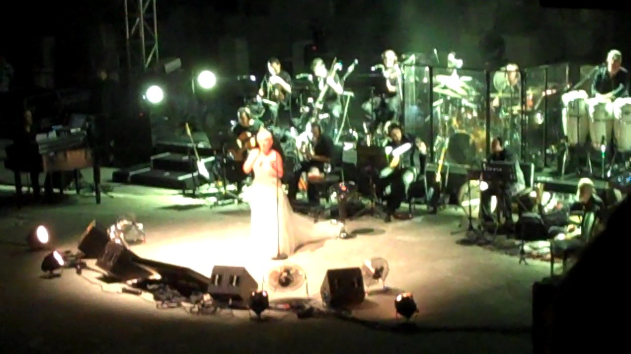 Kendi çekimimden Sezen Aksu konser resmi, Bodrum.